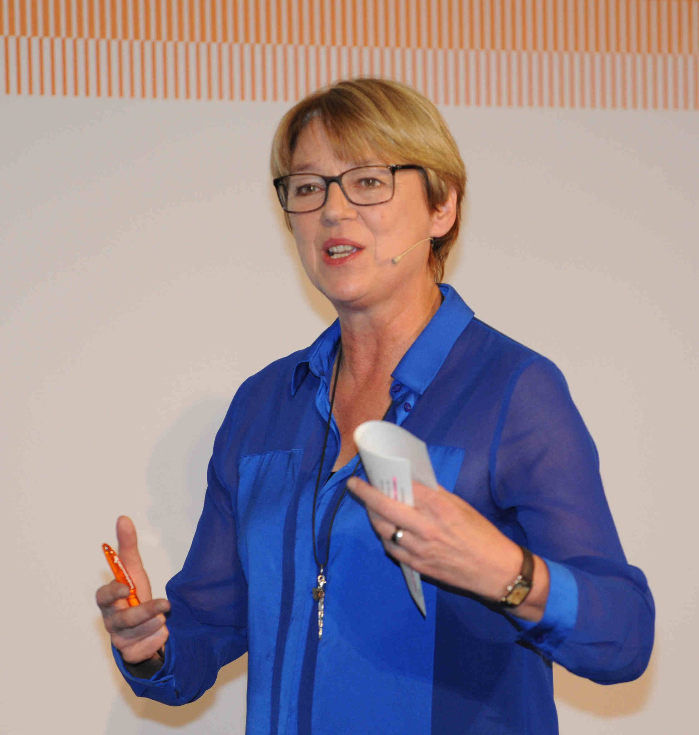 Über 250 Entscheidungsträger und Experten aus der Energiebranche haben sich heute in Düsseldorf zur Auftaktveranstaltung des „Netzwerks Energiewirtschaft“ der EnergieAgentur.NRW getroffen. Unter dem Titel „Neue Märkte und Geschäftsmodelle für die Energiewirtschaft“ ging es darum, wirtschaftliche Zukunftschancen und Perspektiven für die Nutzung innovativer Energiesysteme in Nordrhein-Westfalen auszuloten. Das neugegründete Netzwerk bündelt die in NRW vorhandenen Kompetenzen in Forschung, Entwicklung und Produktion rund um den Energiemarkt der Zukunft. Träger des Netzwerks, das bereits über 430 Mitglieder hat, ist das nordrhein-westfälische Wirtschaftsministerium, koordiniert wird es von der EnergieAgentur.NRW.